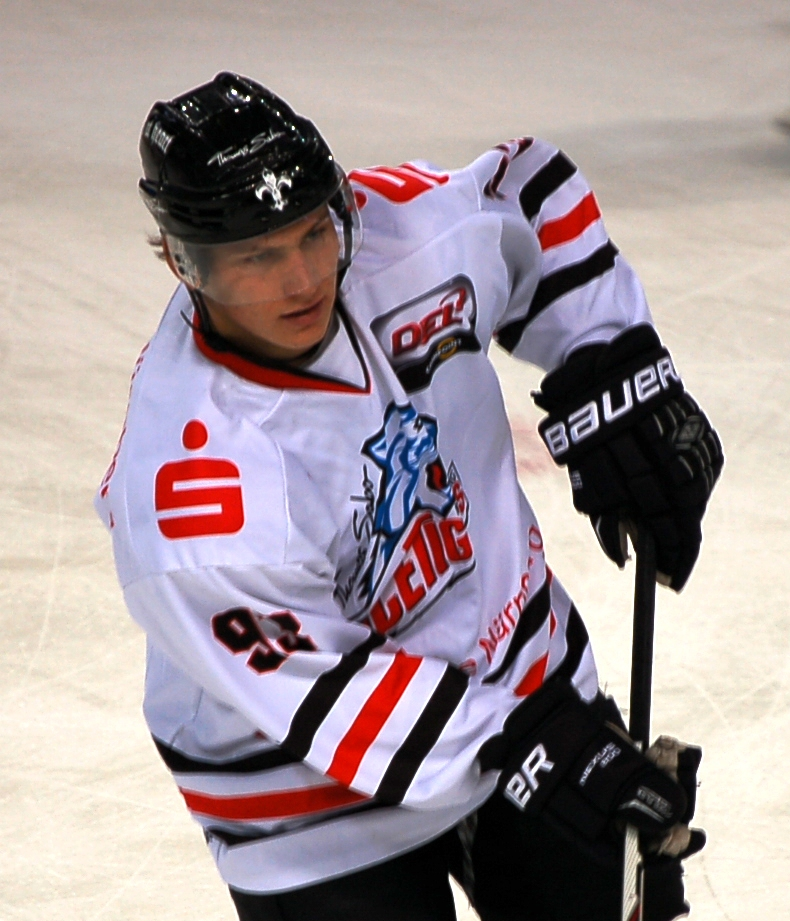 Leonhard Pföderl